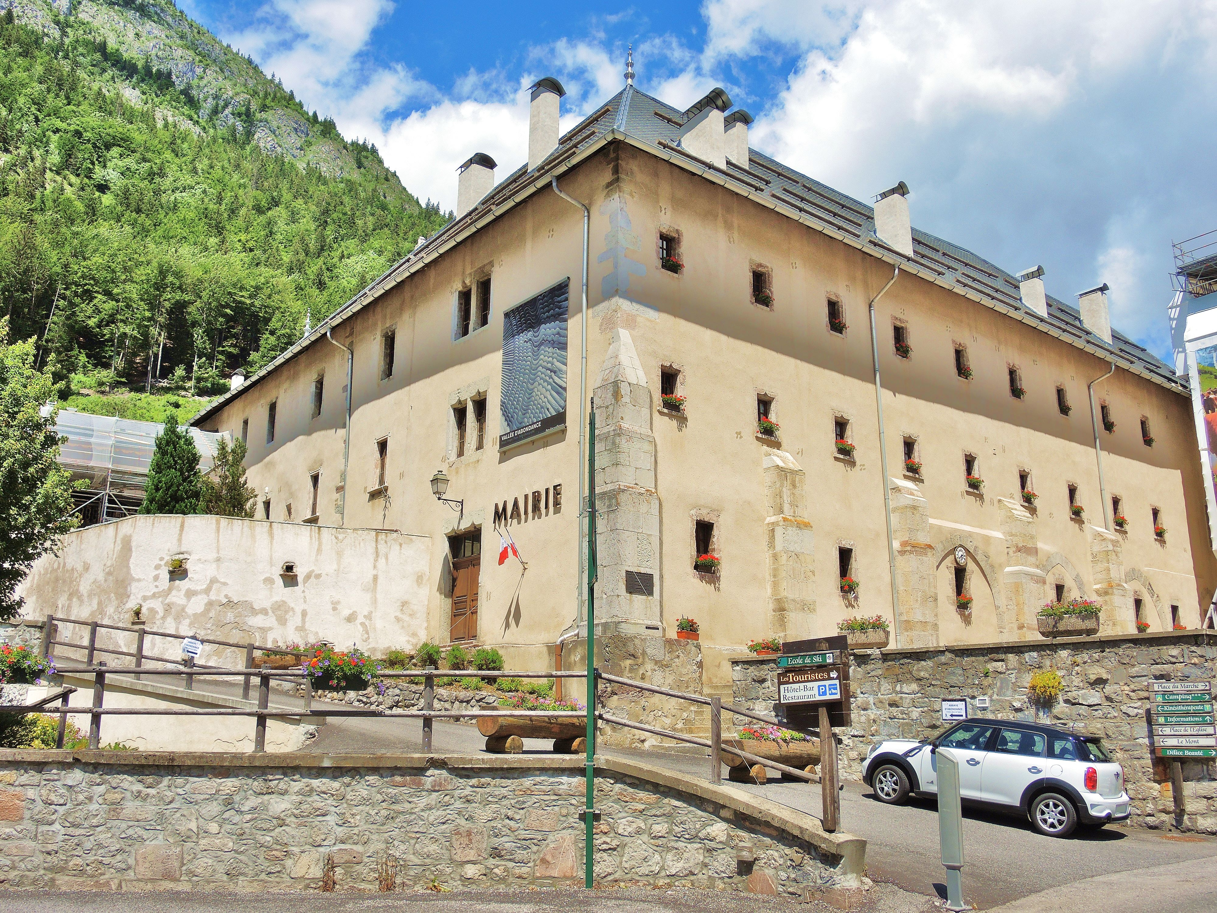 Ancienne abbaye d'Abondance.